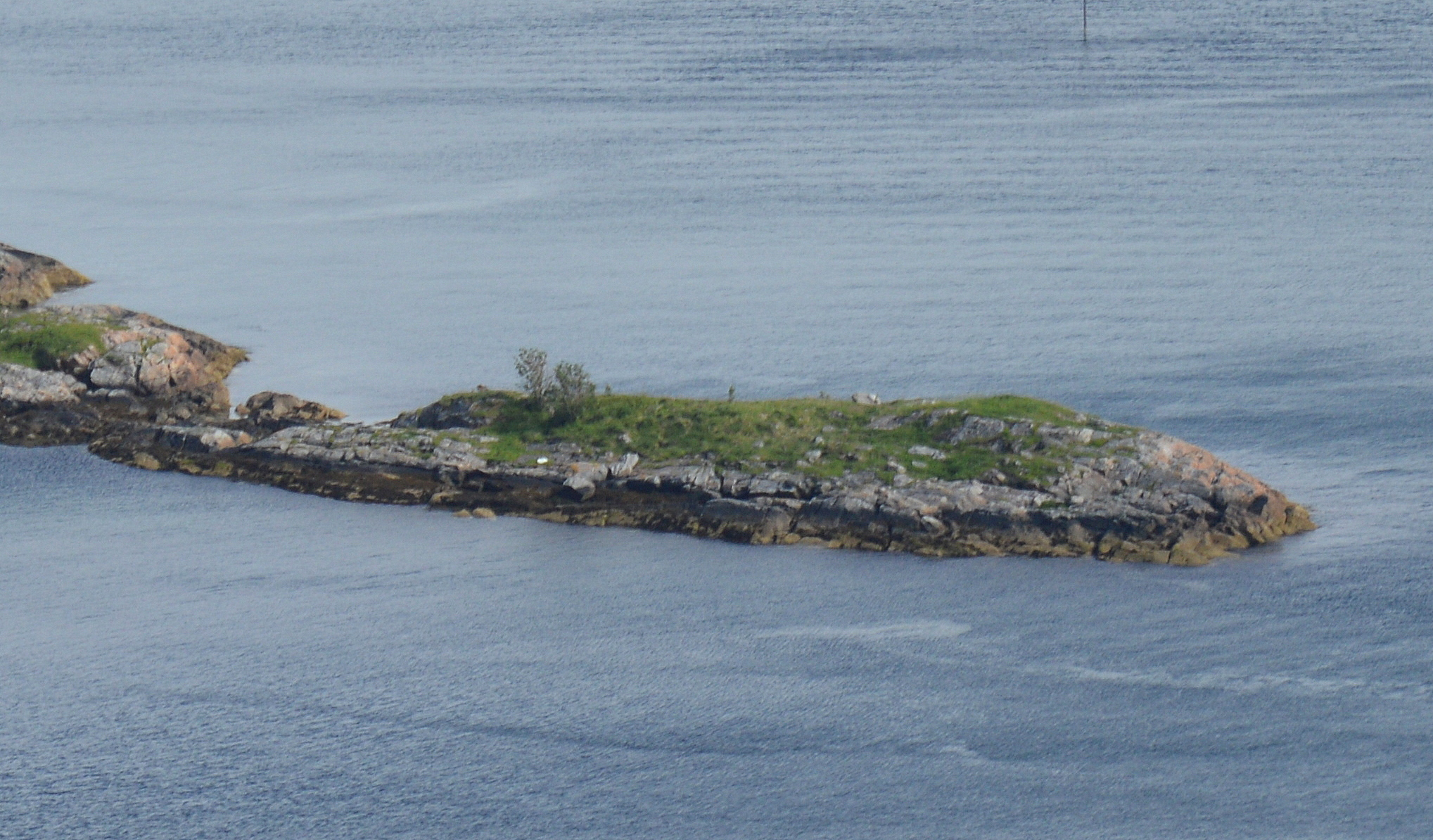 Skrivaren